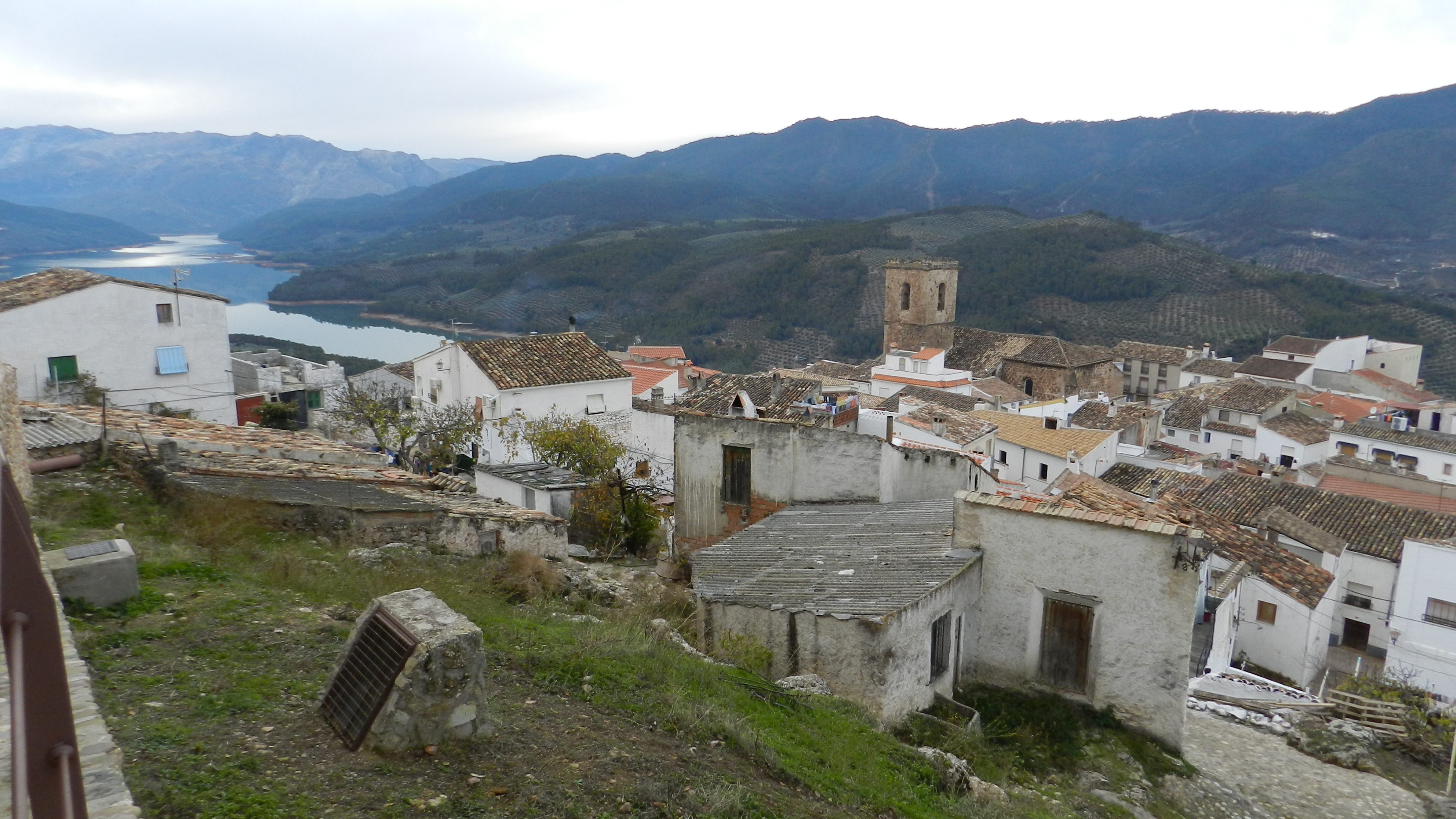 Vista general del pueblo de Hornos de Segura desde el castillo